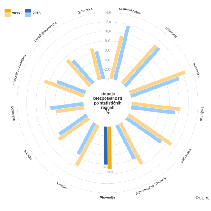 Stopnja brezposelnosti, statistične regije, 2016